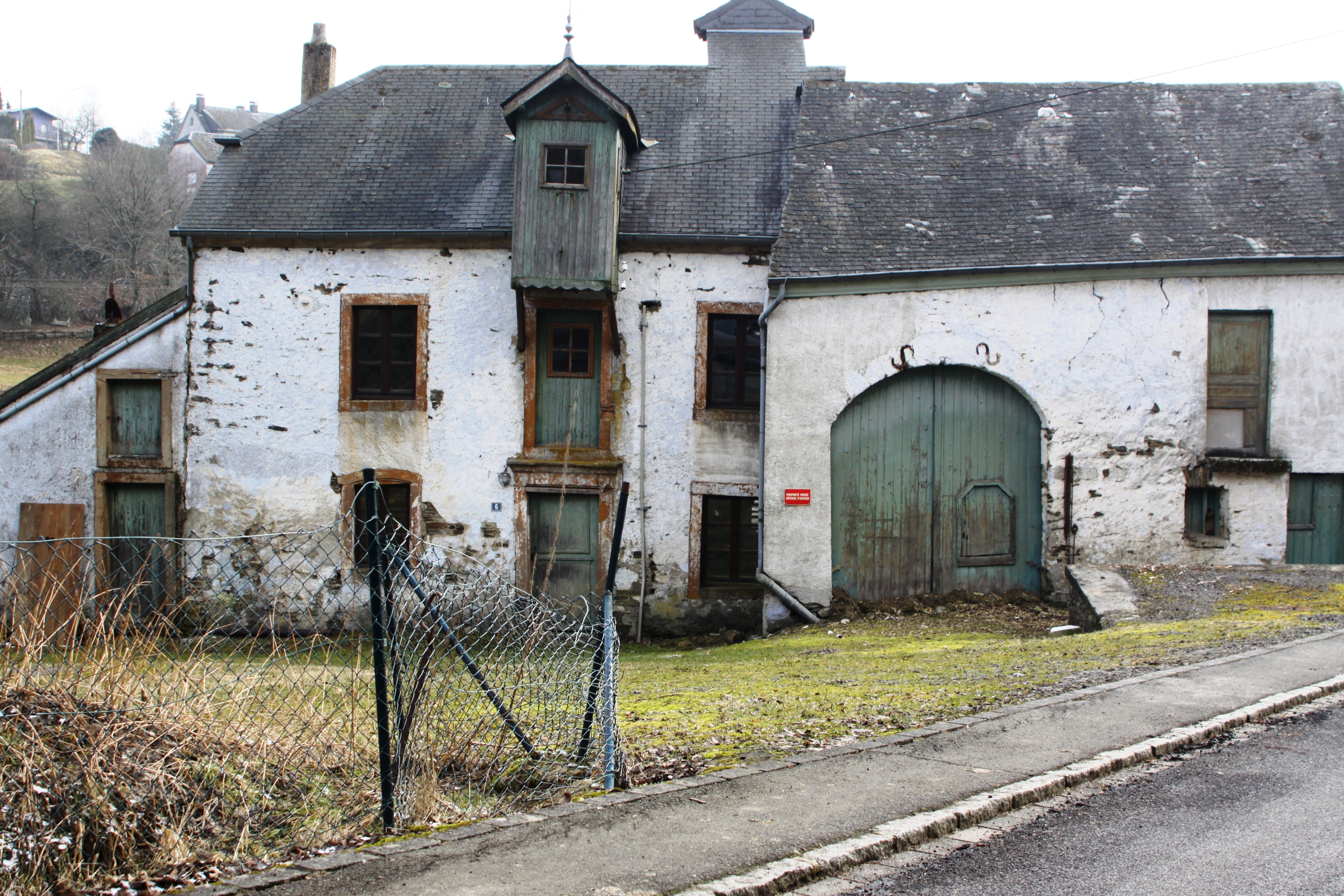 Sirer Millen